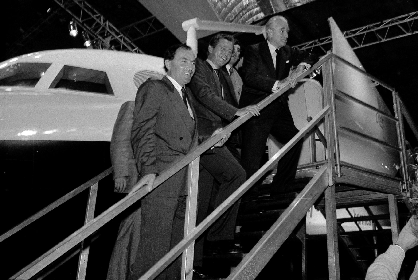 Pas de lieu. Le 10 Octobre 1987. Vue de Dominique Baudis, Jacques Blanc et Jacques Chaban-Delmas lors d'une visite.